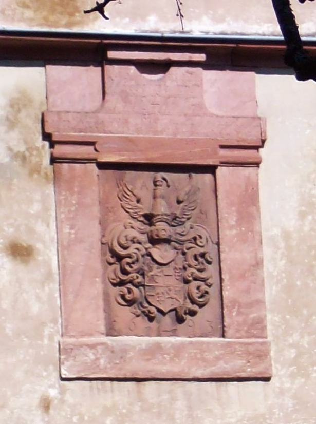 Wasserschloss Oberaulenbach, Wappen von Mairhofen, Südseite Wasserschloss, unterhalb Mittelgiebel